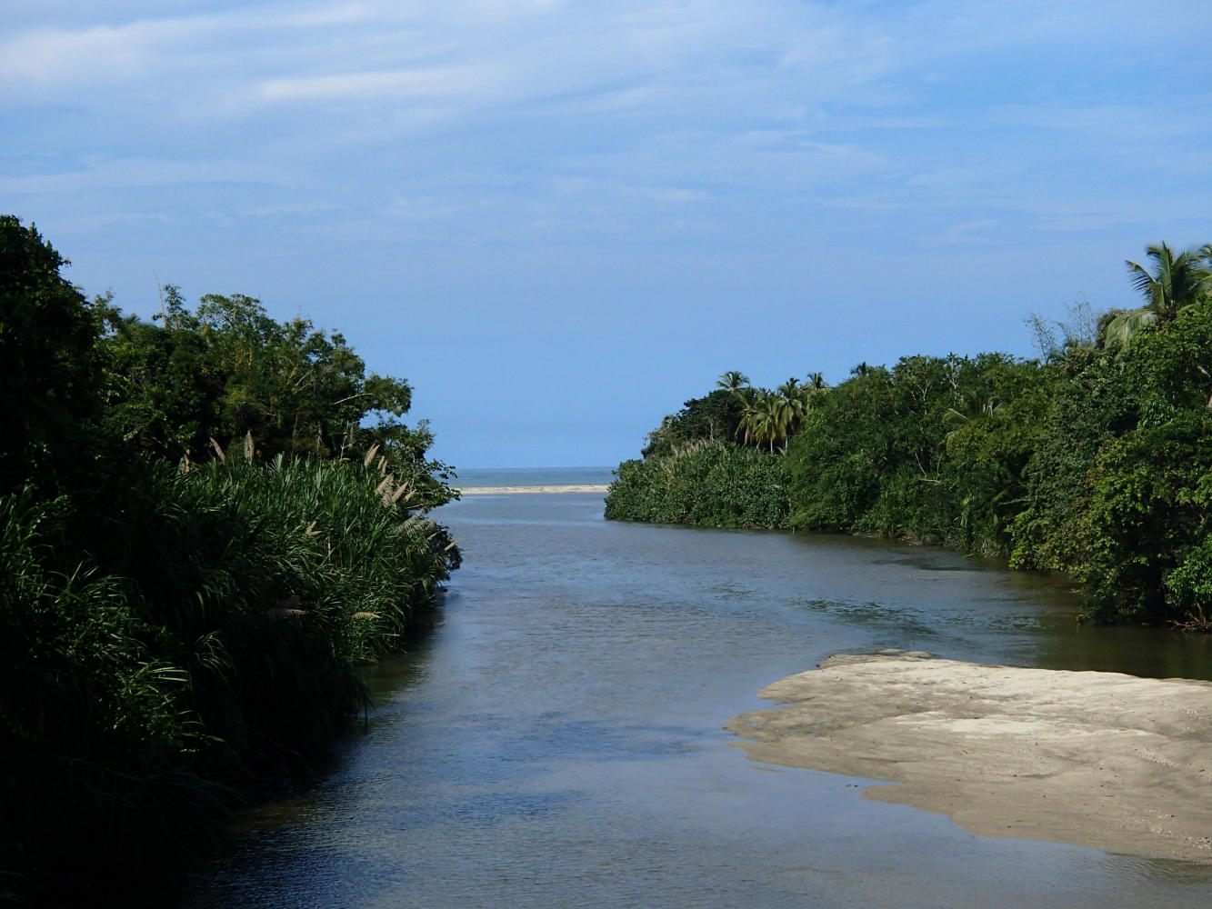 La desembocadura del río Mendihuaca en el mar Caribe, Colombia